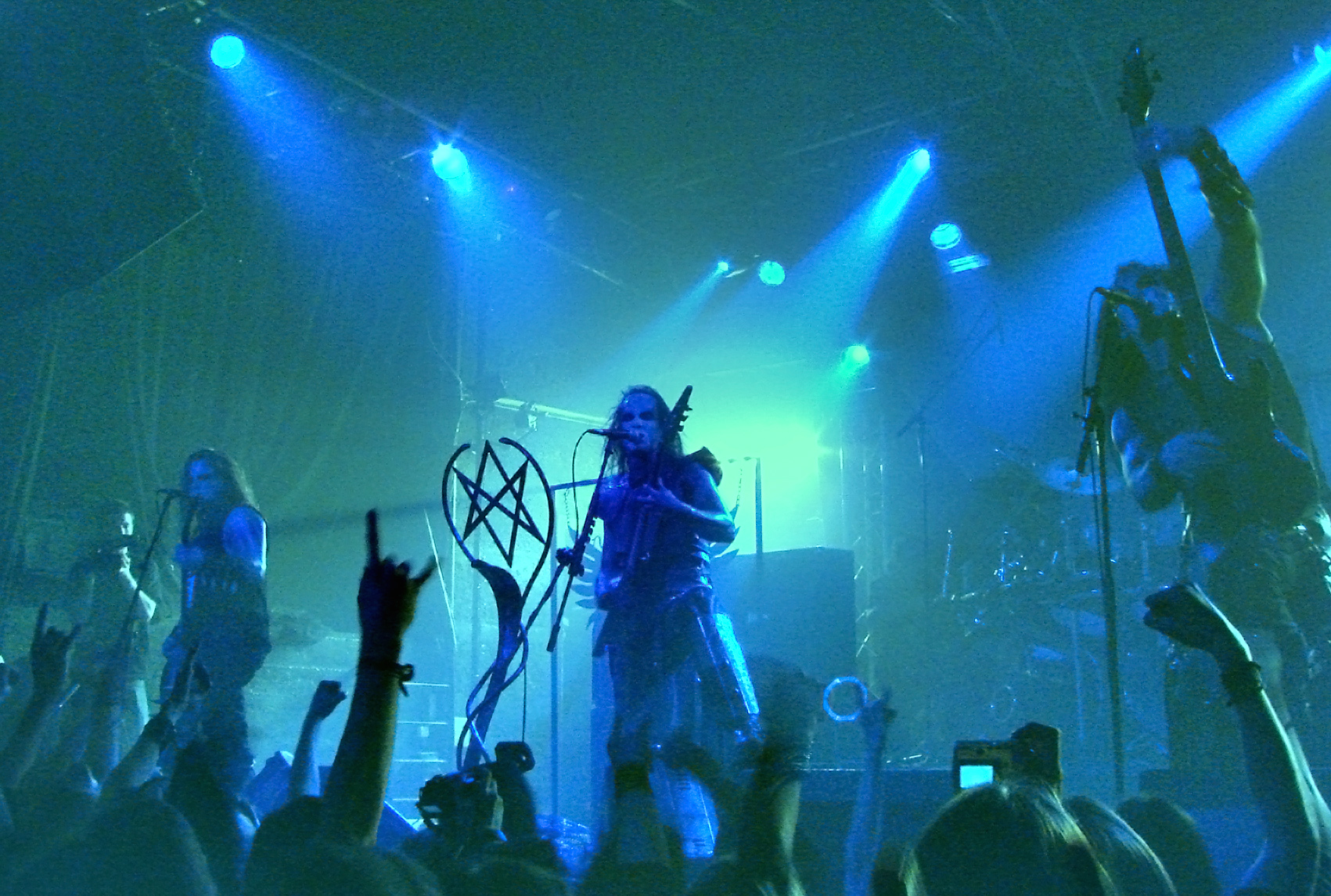 Behemoth en concert à La Locomotive, à Paris, le 17/02/2008.